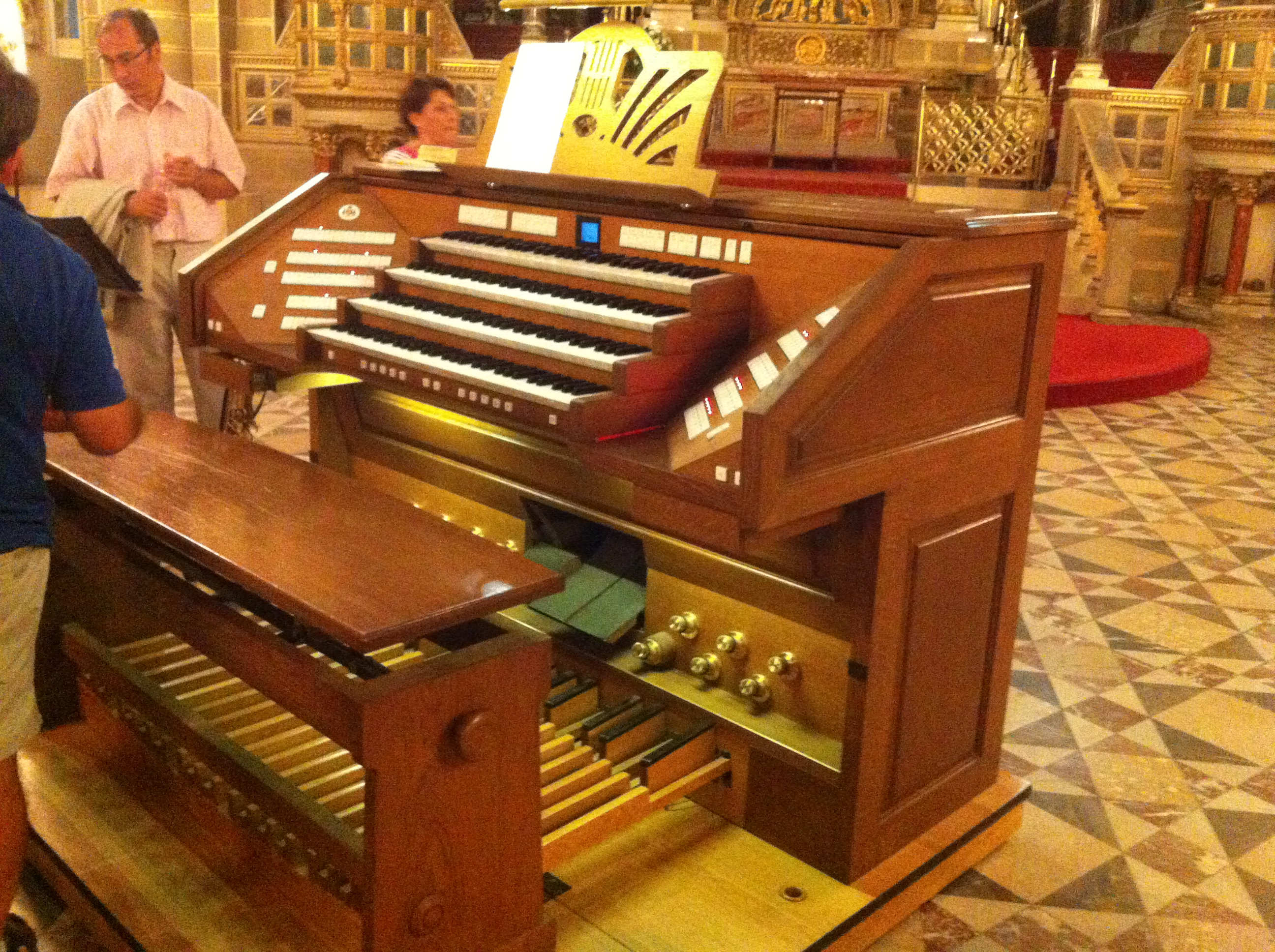 A Pécsi Székesegyház négy manuálos, több mint 6000 síppal rendelkező orgonája (Pécs, Szent István tér 23.)